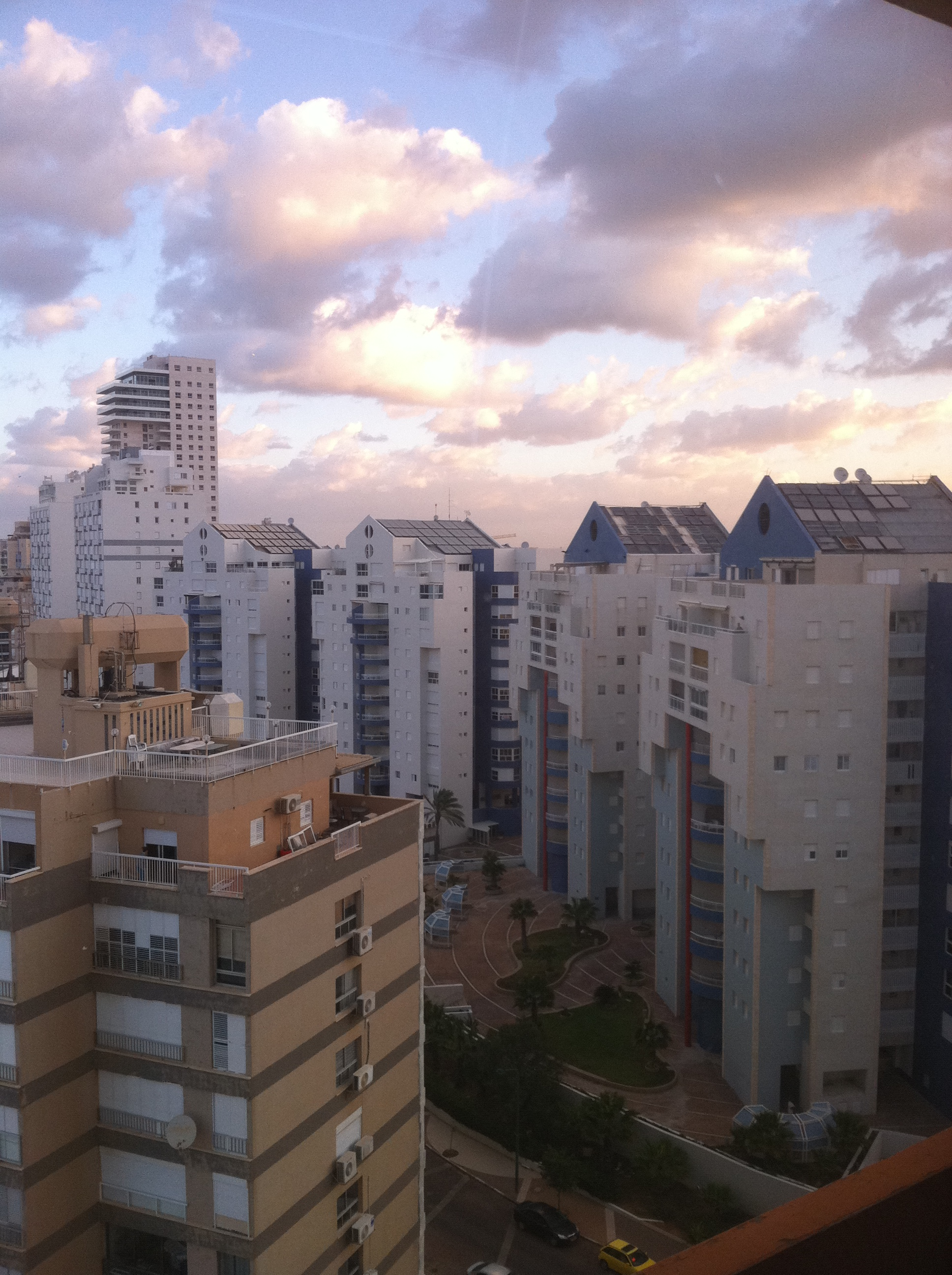 NOCHE EN NAHARIA ciudad en ISRAEL